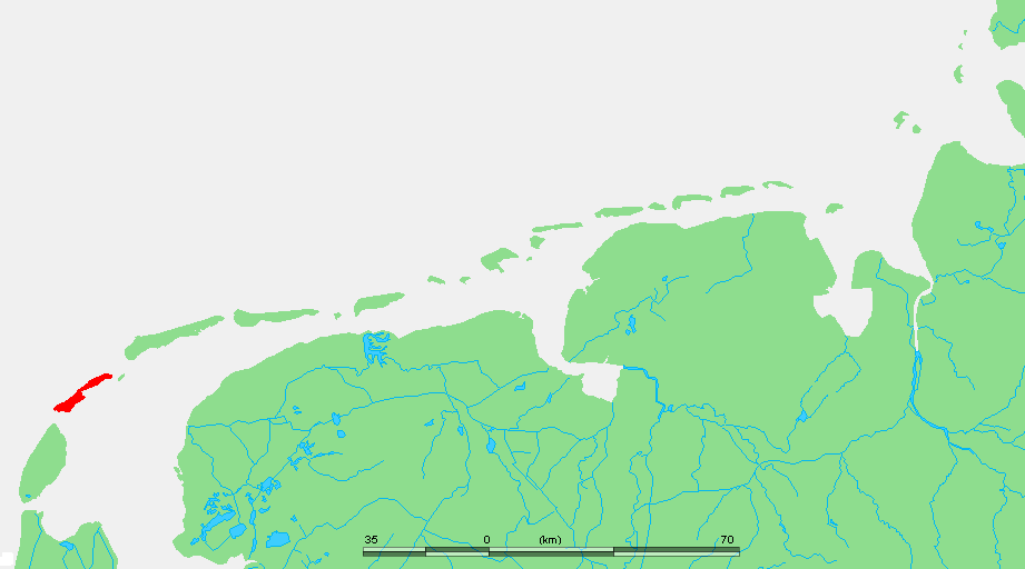 Wadden - Vlieland.PNG